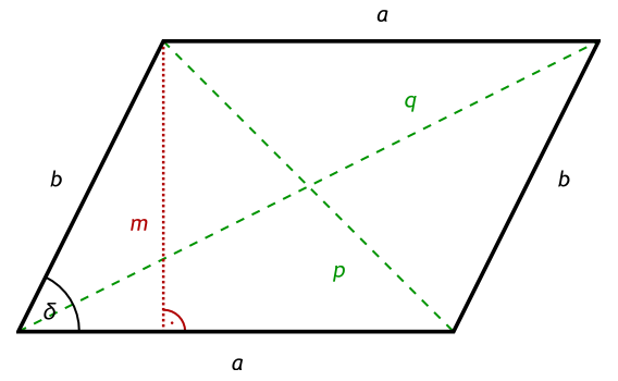 Paralelogramma magassága, oldalai, átlói és egy szöge